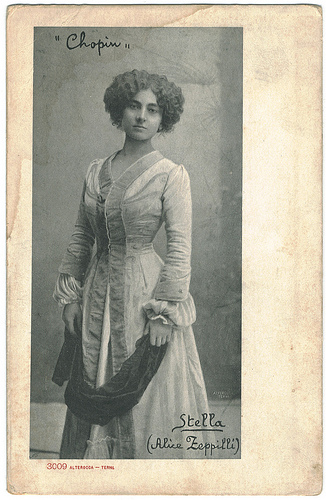 Il soprano Alice Zeppilli nei panni di Stella nell'opera Chopin di Giacomo Orefice